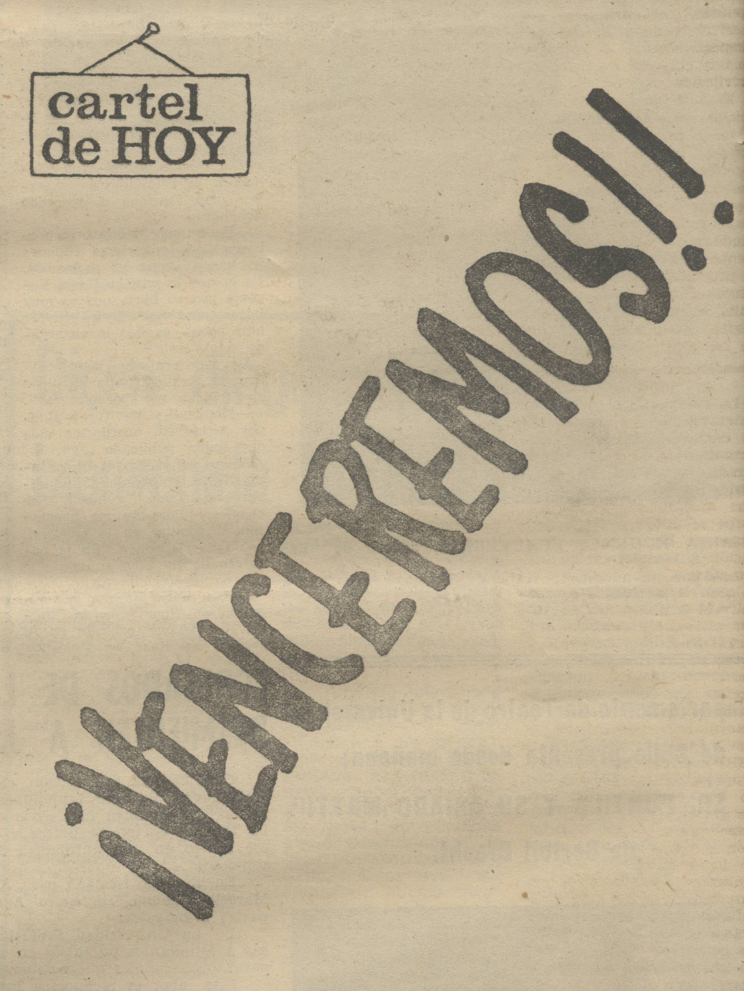 "el cartel de hoy" en periódico Puro Chile: ¡Venceremos!